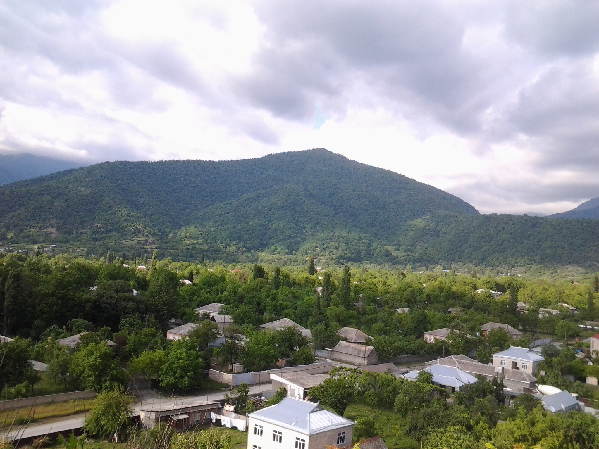 Balakən